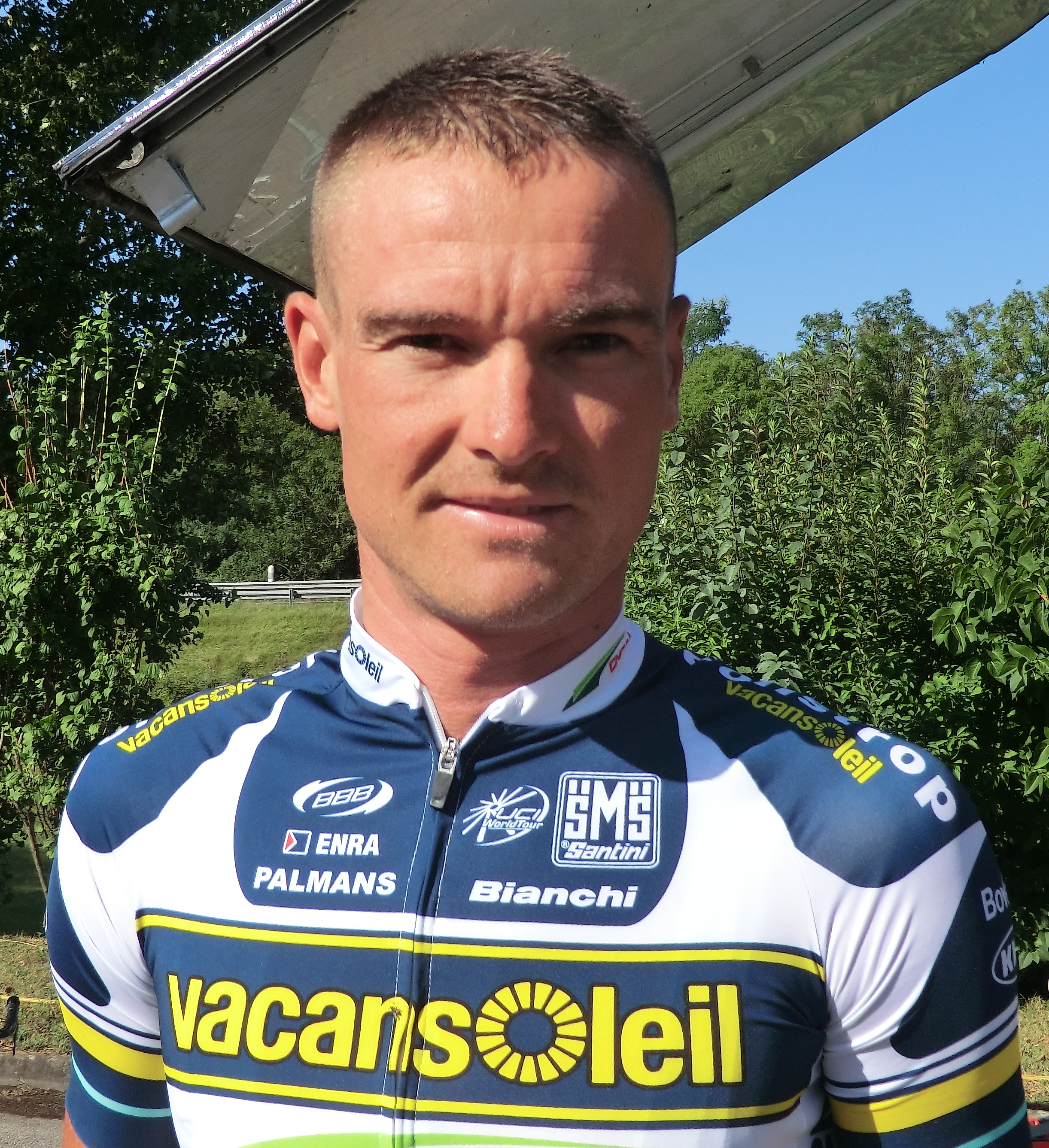 Coureurs à l'échauffement au matin du prologue du tour de l'Ain 2013, à l'hôtel Lyon-Est à Saint-Maurice-de-Beynost.